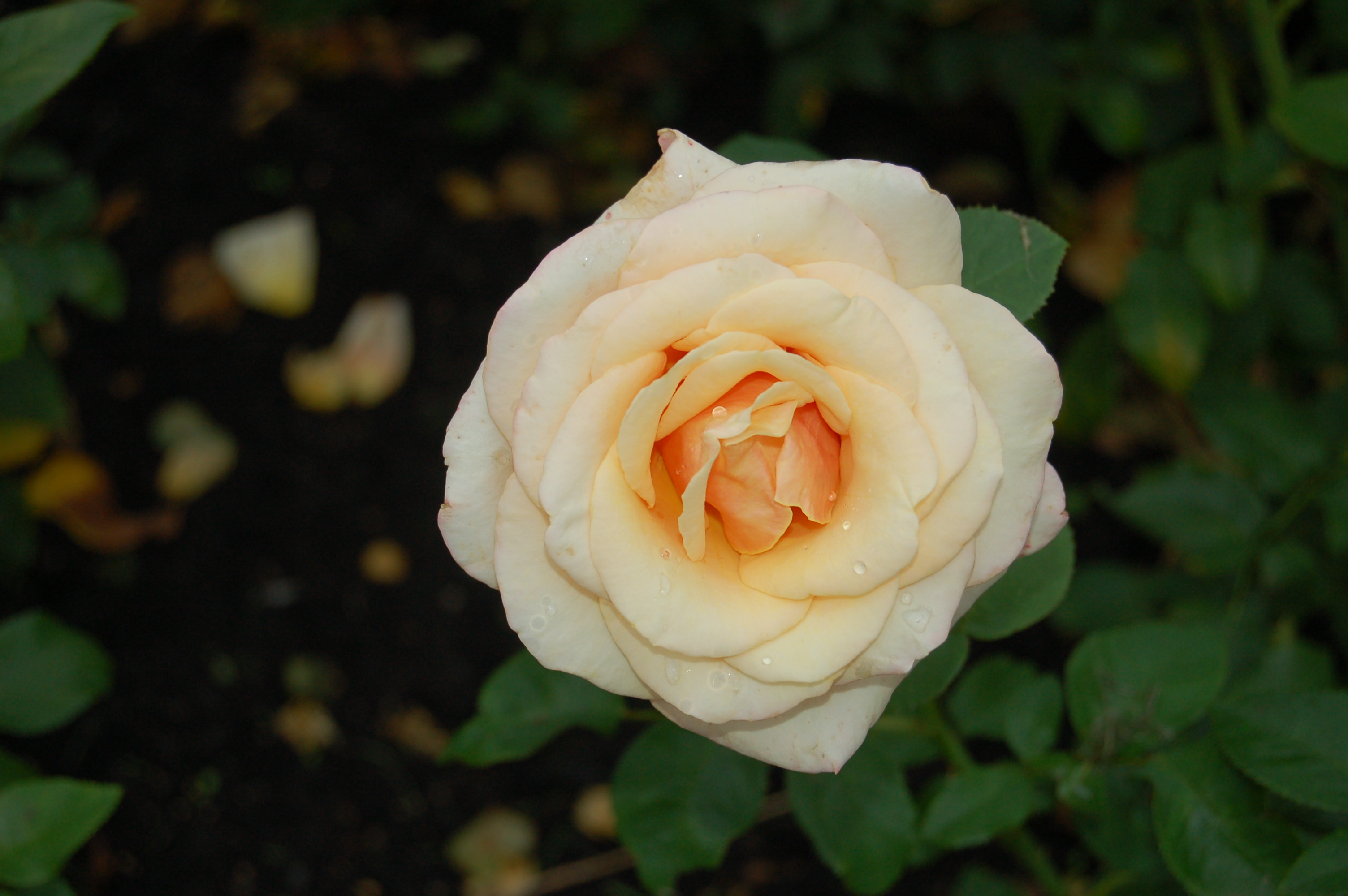 Rosa 'Paul Ricard'